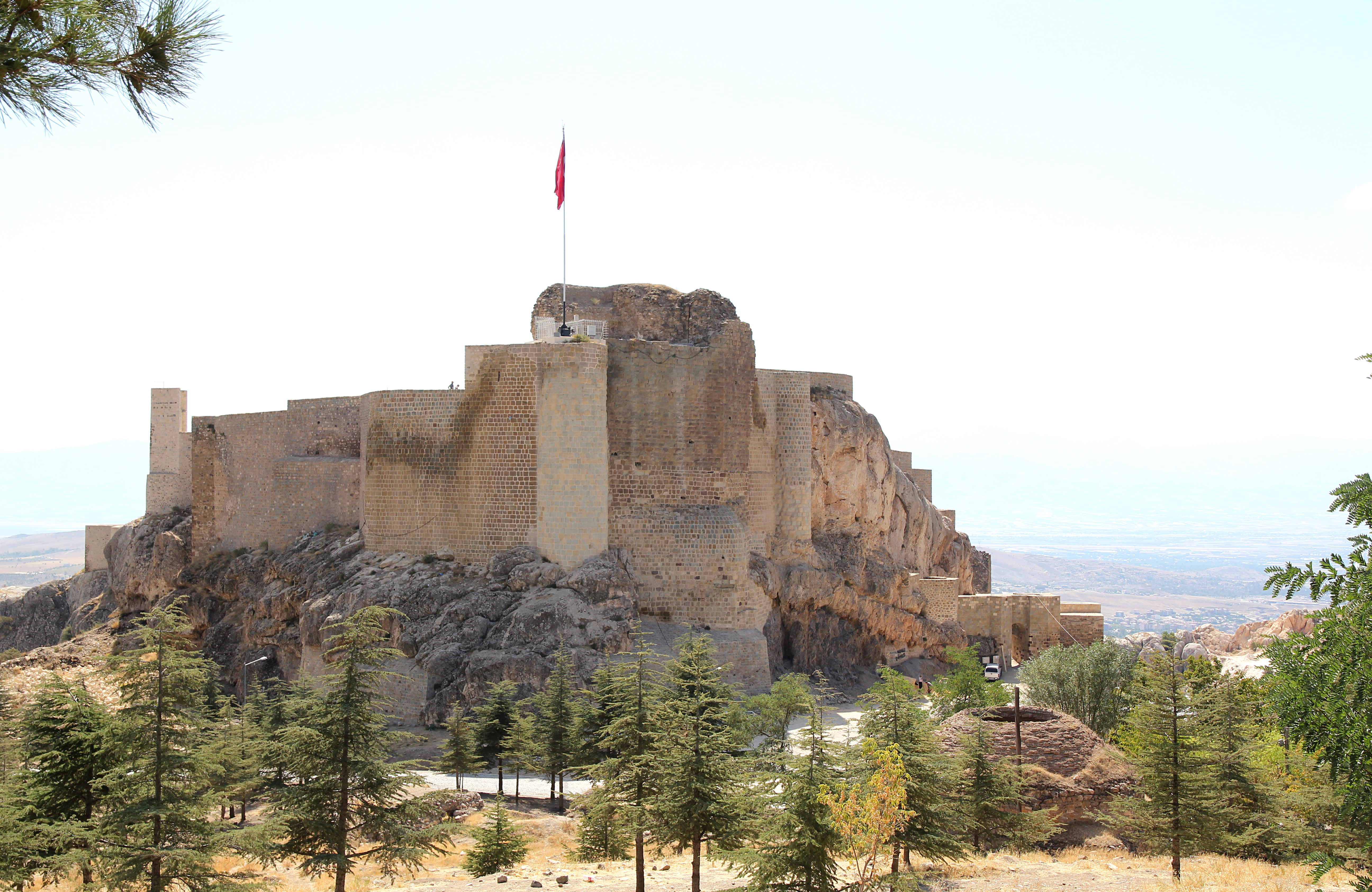 Festung von Harput in der türkischen Provinz Elâzığ, türkisch Harput Kalesi oder Süt Kalesi